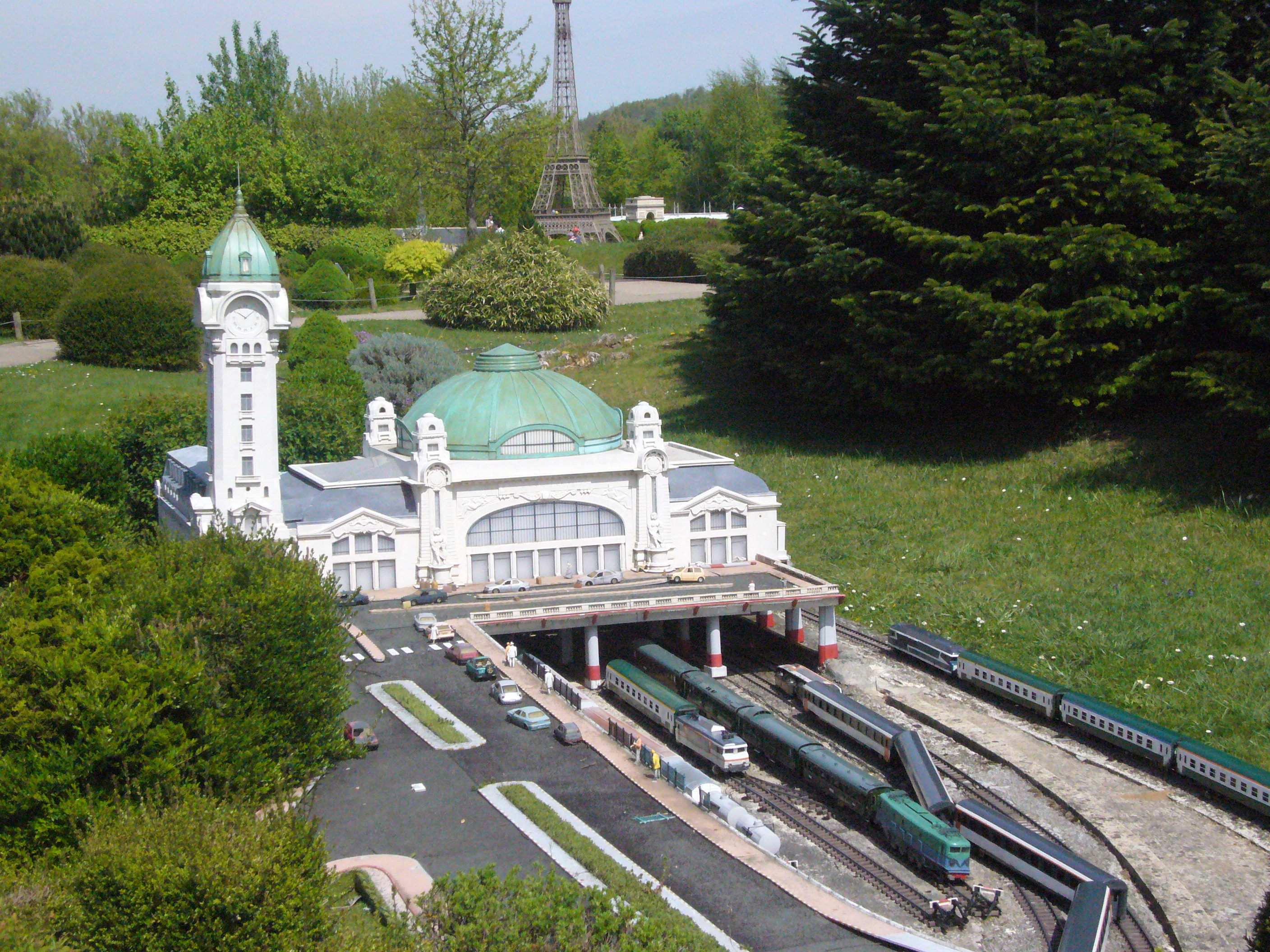 Maquette de la gare de Limoges-Bénédictins au parc de France Miniature à Élancourt (Yvelines, France)